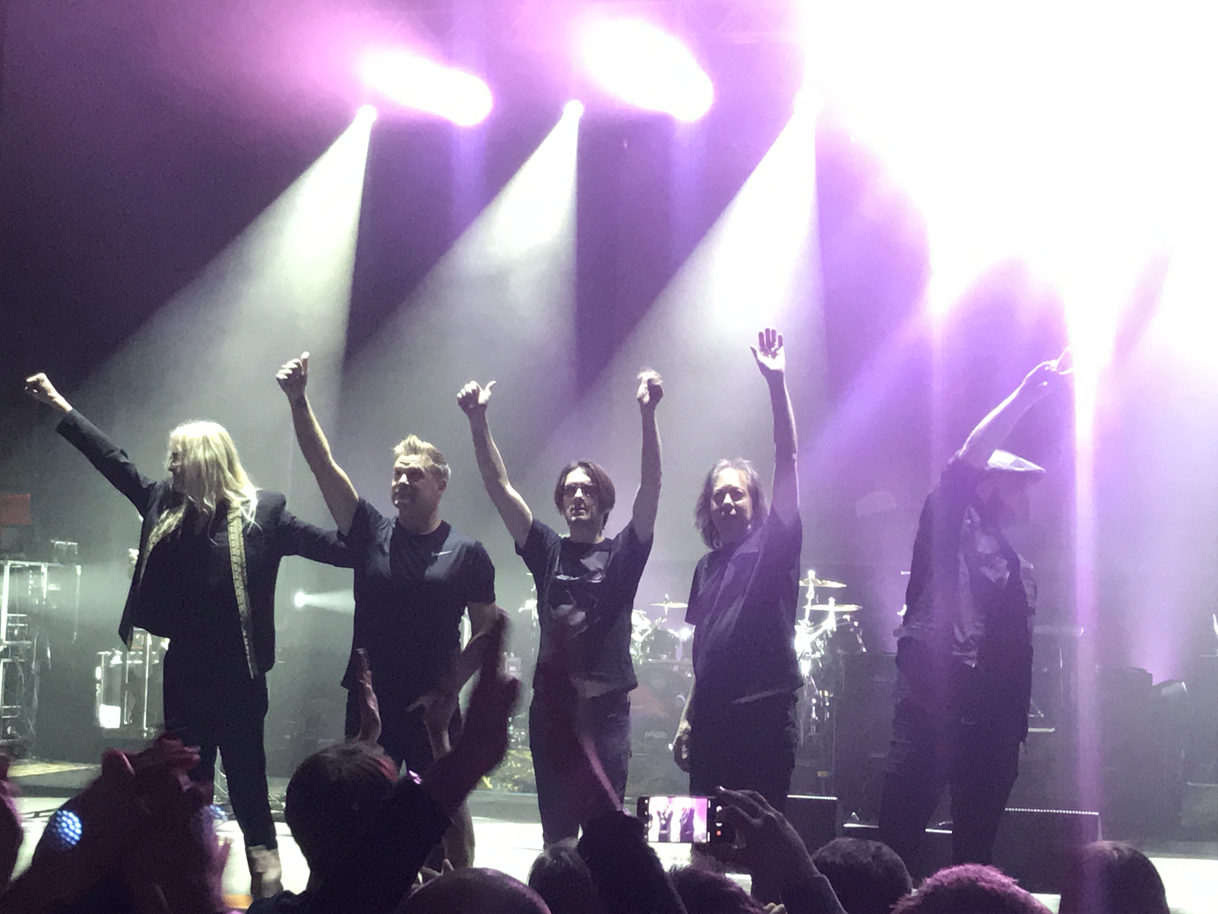 Стівен Вілсон по центру